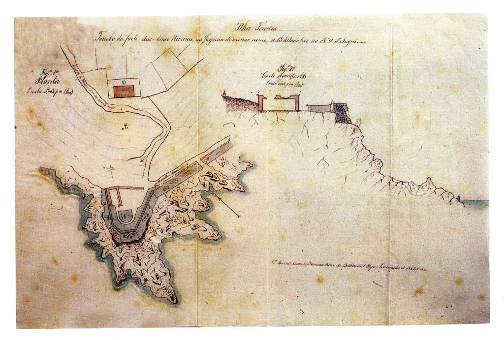 "Tombo do Forte das Cinco Ribeiras, na freguesia de mesmo nome...", Ilha Terceira (Açores), Portugal.